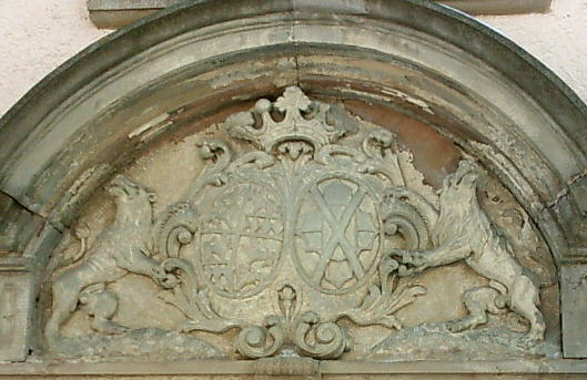 Wappen über einer der Türen des Schlosses in Kupferzell, Allianzwappen Hohenlohe / Oettingen